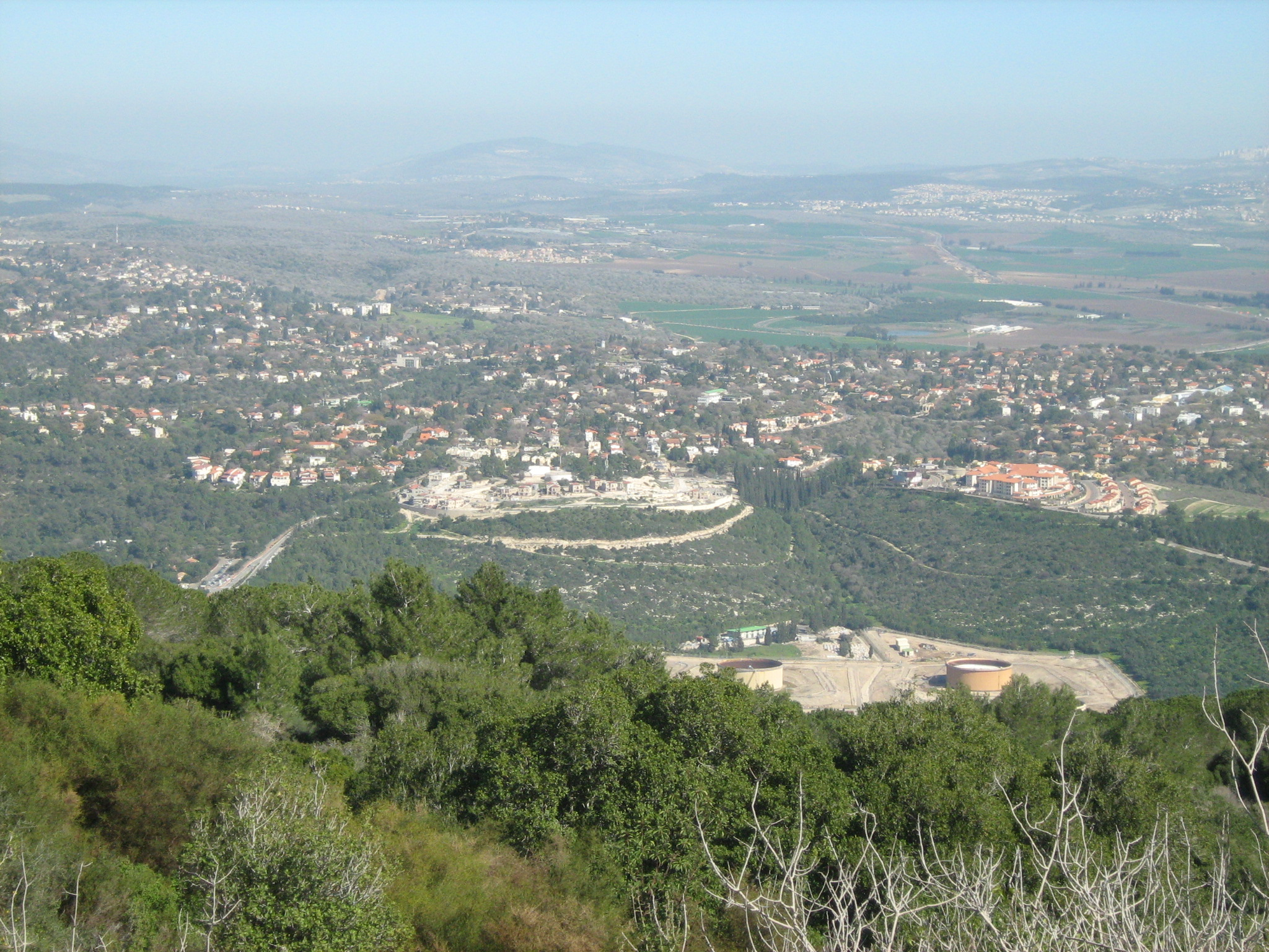 קריית טבעון מהכרמל רישיון נוצר על ידי משתמש:Ori